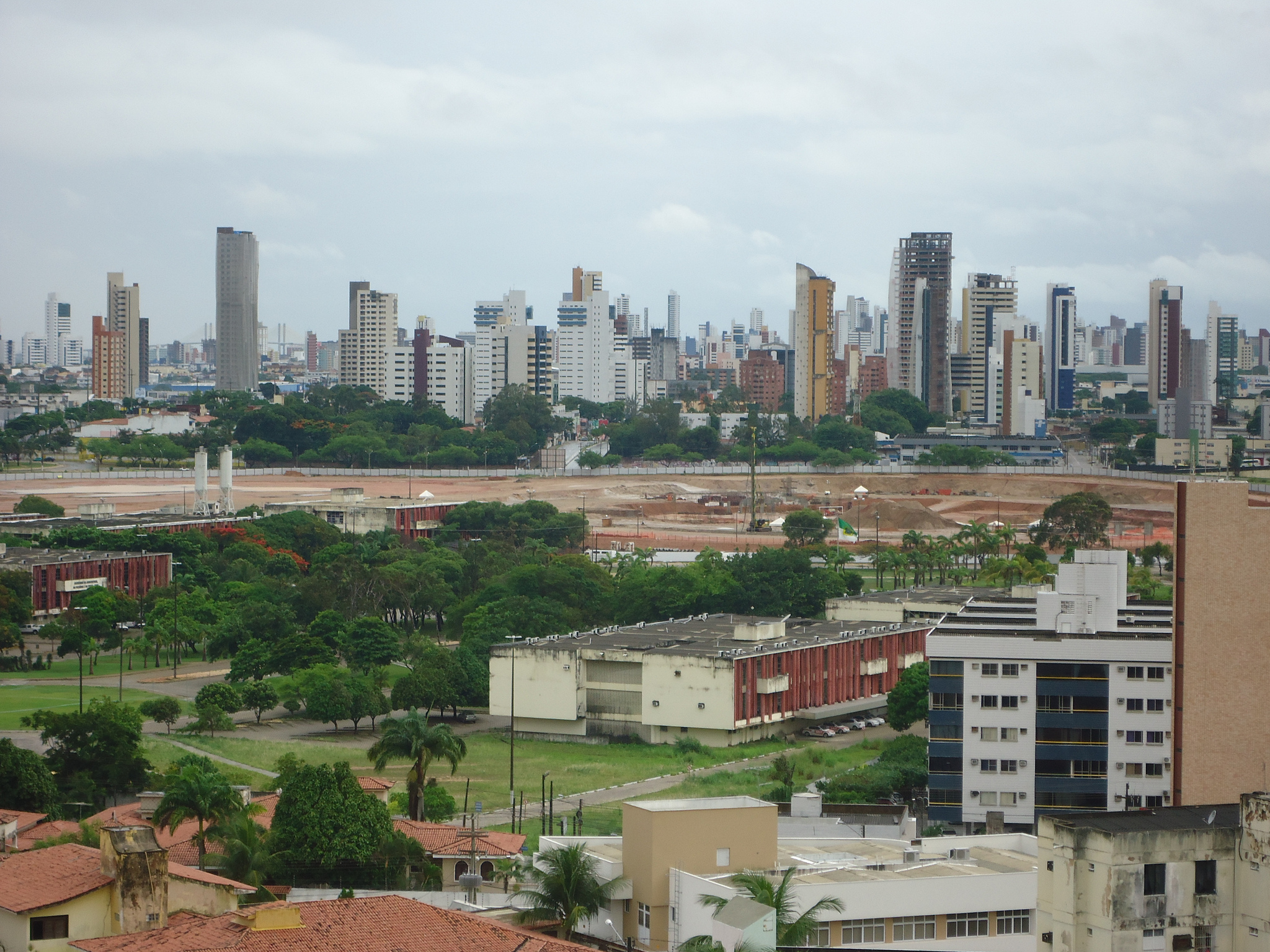 Centro Administrativo do Governo do Estado do Rio Grande do Norte. Canteiro de obras da Arena das Dunas e skyline de Natal ao fundo.